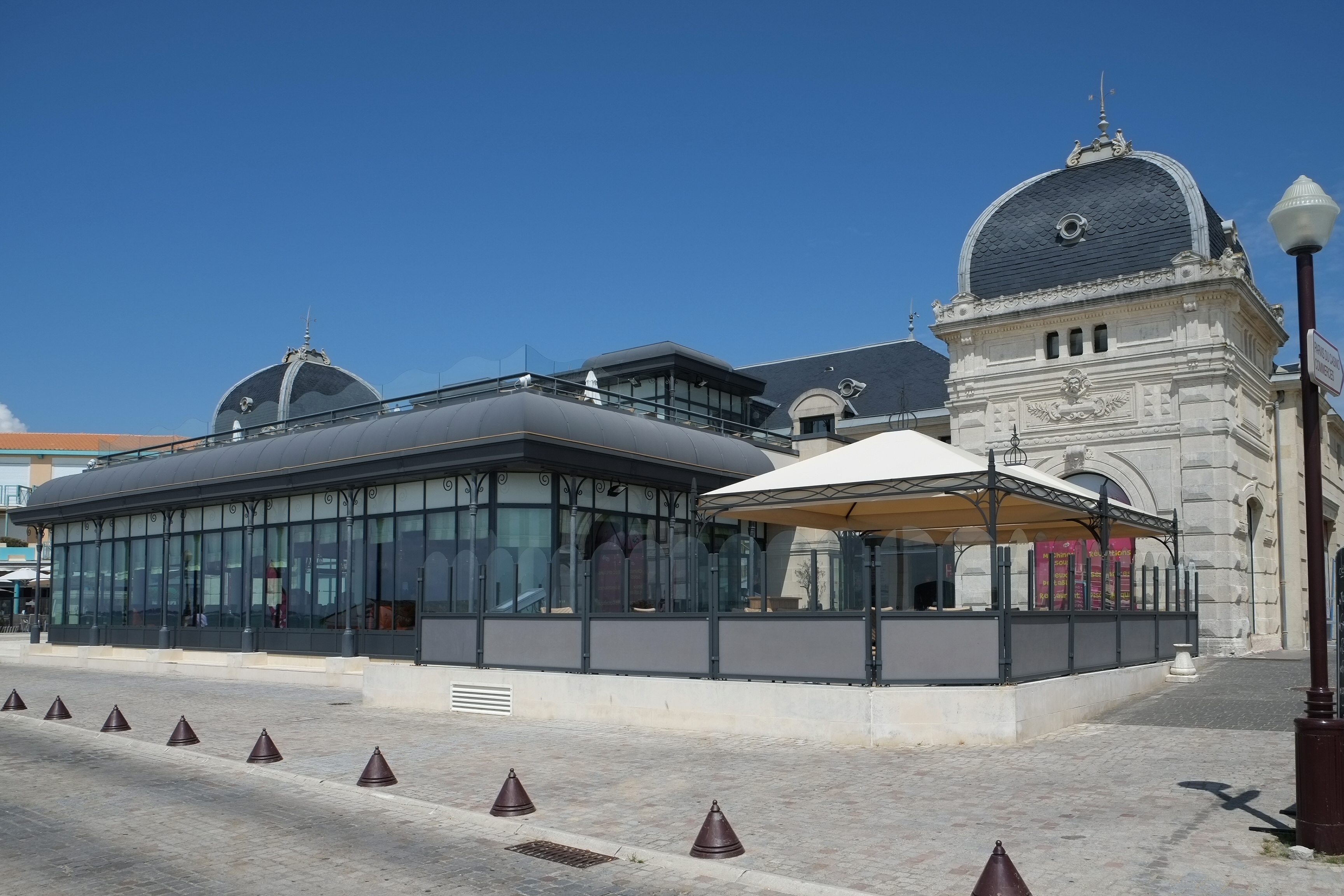 Casino Châtelaillon-Plage Charente-Maritime France